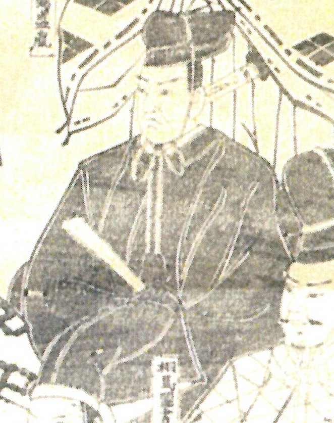 相馬家16代当主相馬義胤の画像(「相馬家歴代藩主像」より)。